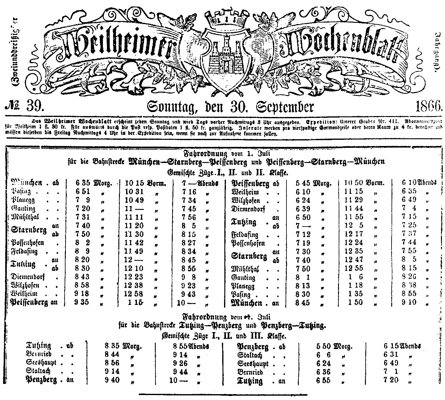 Fahrordnung vom 1. Juli 1866 für die Bahnstrecken München–Starnberg–Peißenberg und Tutzing–Penzberg. Abgedruckt im Weilheimer Wochenblatt, Nr. 39, Sonntag den 30. September 1866